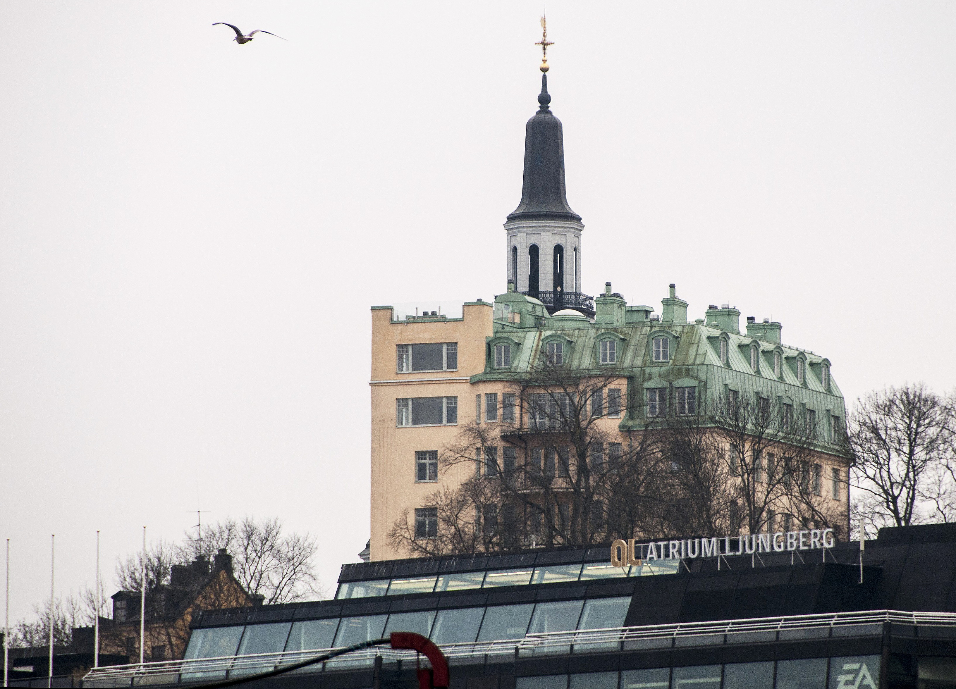 Höga Stigen Större 17, Fiskargatan 9, Svartensgatan 27-29, Uppförd 1907-1908. Arkitekt Knut Peterson, byggherre AB F Perno, byggmästare A Nordström.